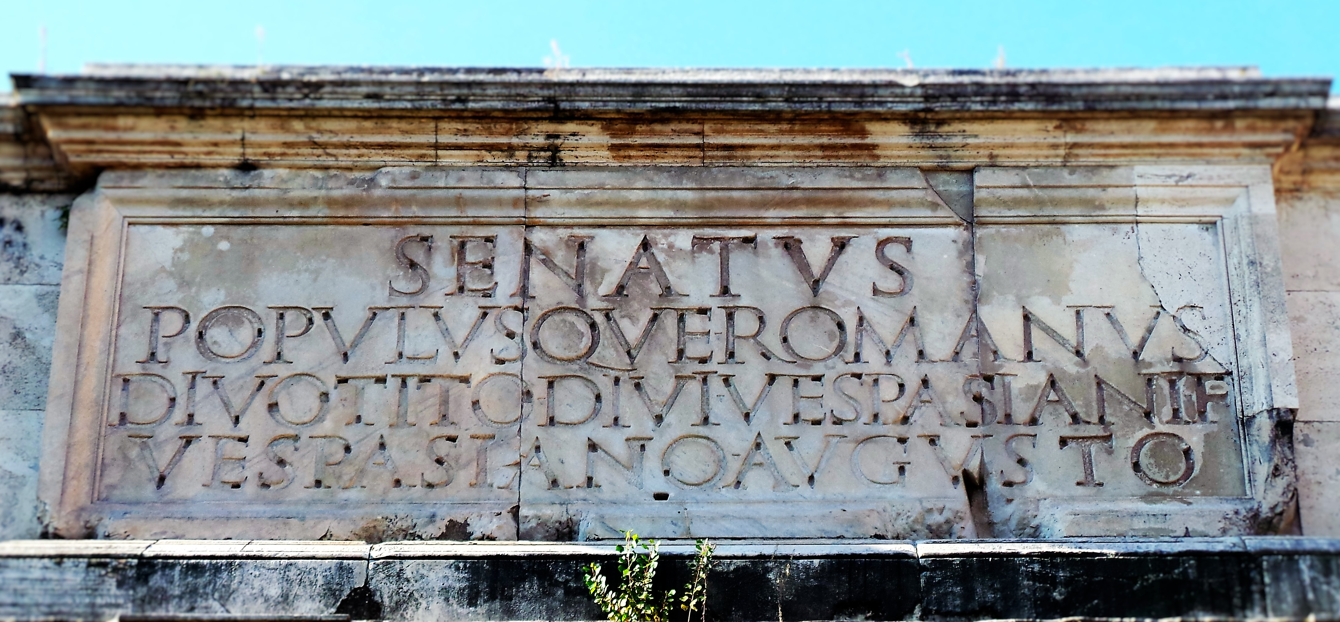 Dedikationsinschrift (Ostseite)